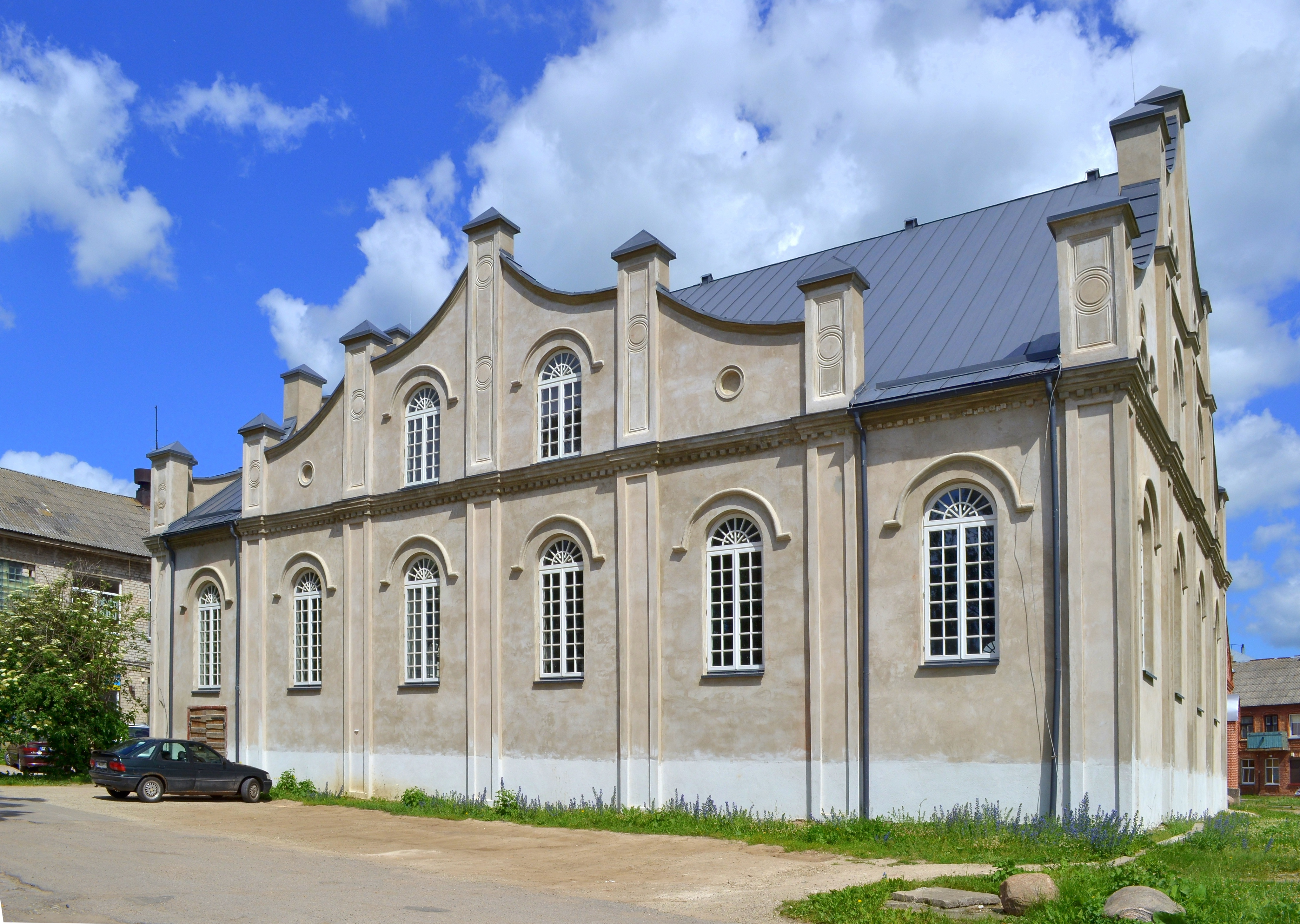 Baltoji Joniškio sinagoga